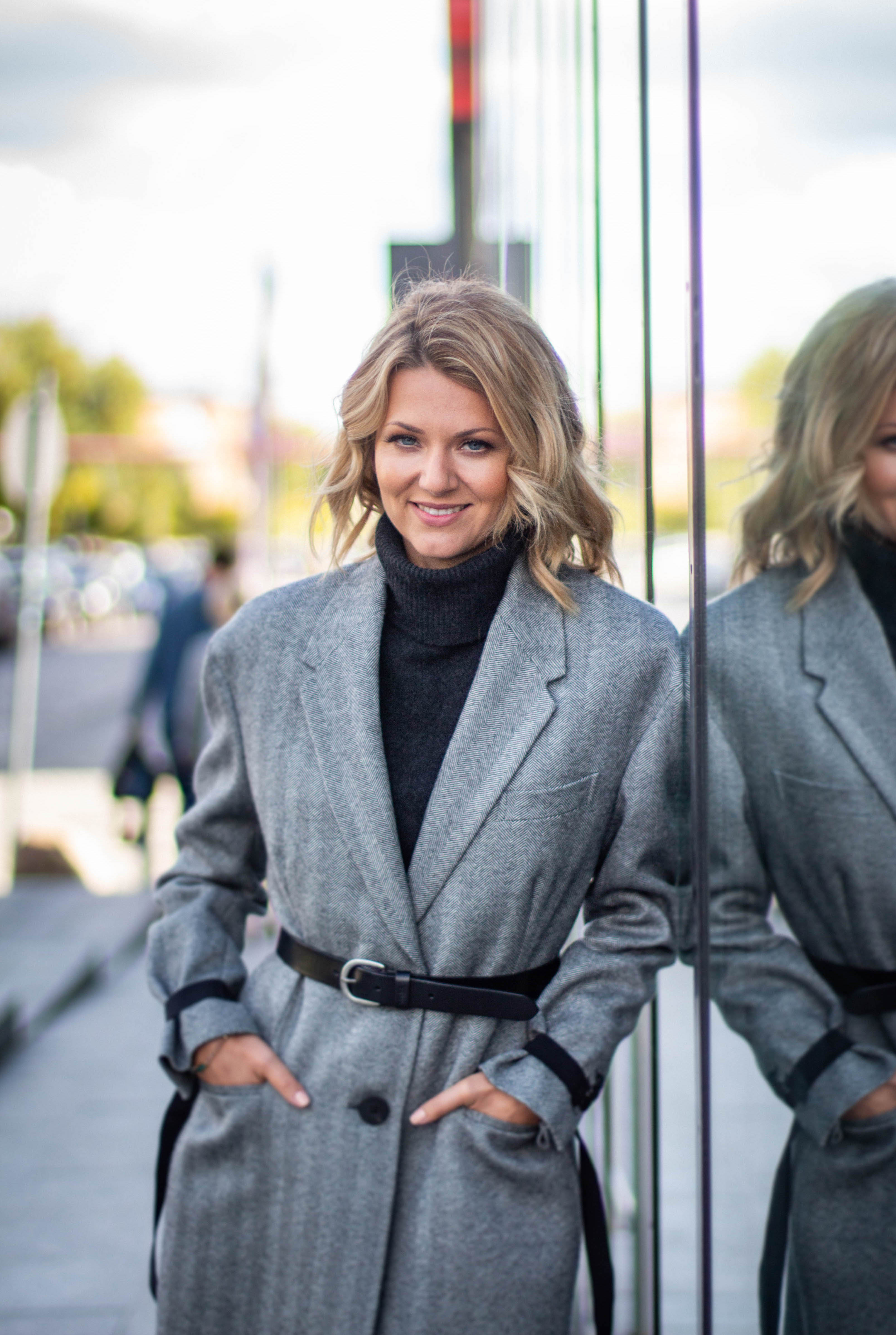 Herbst-Shooting mit Ella Endlich